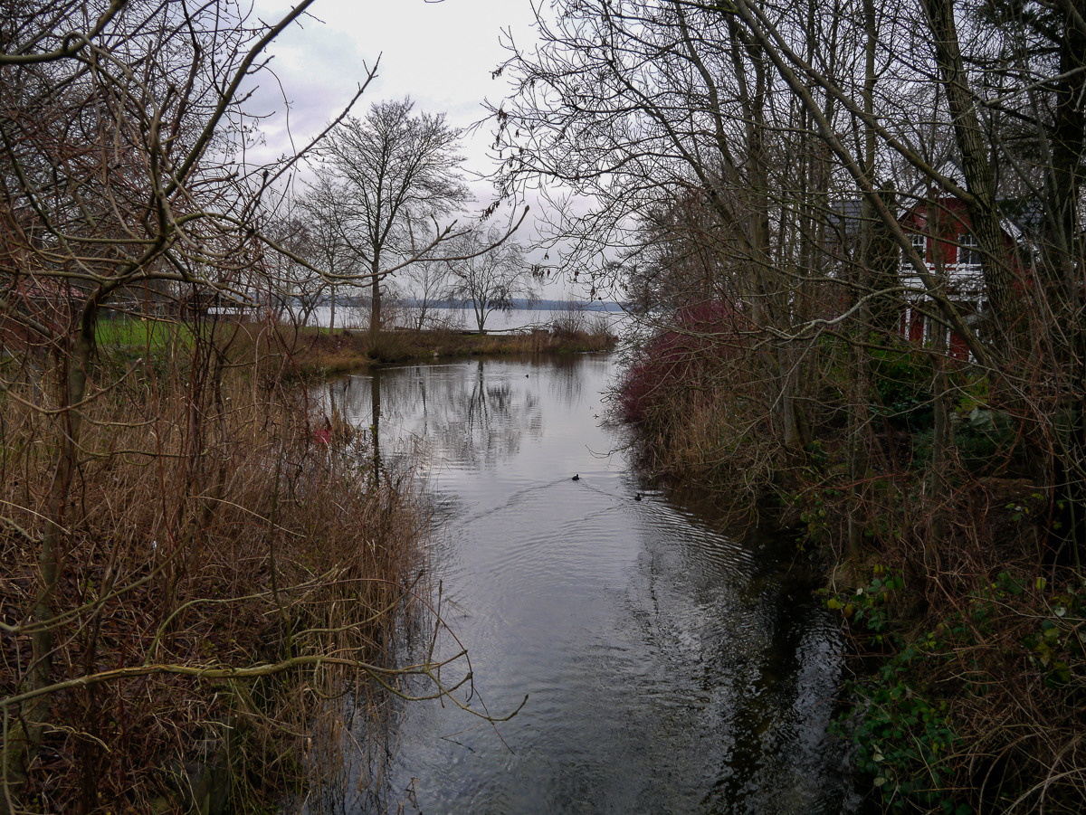 Schirnau Mündung zum Wittensee in Bünsdorf